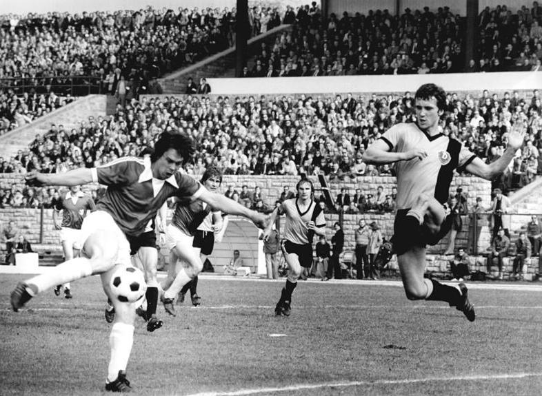 ADN-ZB Mittelstädt 29.4.78 Berlin: FDGB-Fussballpokalendspiel 1. FC Magdeburg - Dynamo Dresden Der 1. FC Magdeburg gewann am 29.4.78 vor 50.000 Zuschauern im Stadion der Weltjugend in Berlin das Endspiel um den FDGB-Fußballpokal gegen Dynamo Dresden mit 1:0 (1:0) und errang damit zum fünften Mal die Trophäe. Hier eine Spielszene mit Jürgen Sparwasser (l., Magdeburg) und Gerd Weber (r. Dresden).